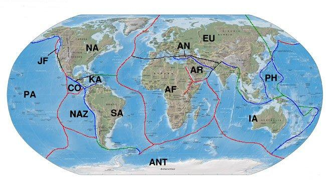 Weltkarte mit skizzenhaft eingezeichneten Erdplatten. Rot: divergierende Plattengrenze Blau: konvergierende Plattengrenzen Schwarz: Transformstörung Grün: Verlauf der Grenze unsicher Abkürzungen: AN: anatolische Platte ANT: antarktische Platte AF: afrikanische Platte AR: arabische Platte CO: Cocos Platte EU: eurasische Platte IA: indisch-australische Platte JF: Juan de Fuca Platte KA: Karibische Platte NA: nordamerikanische Platte NAZ: Nazca Platte PA: pazifische Platte PH: philippinische Platte SA: südamerikanische Platte